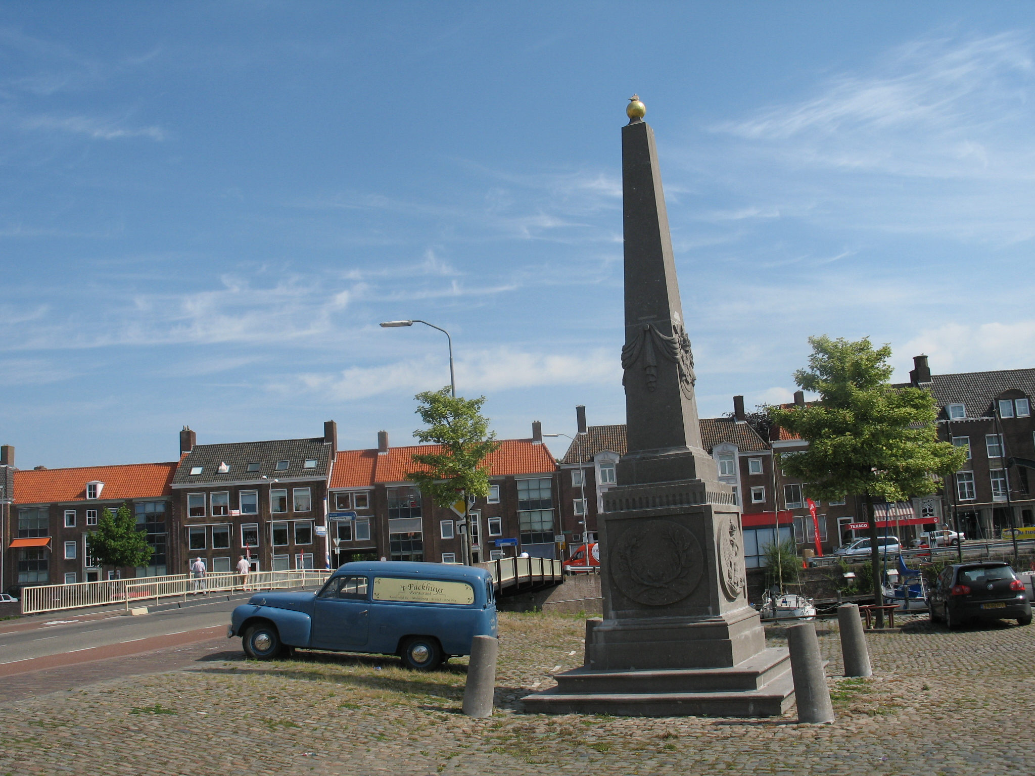 Rijksmonument in Middelburg Rijksmonumentnummer: 29723